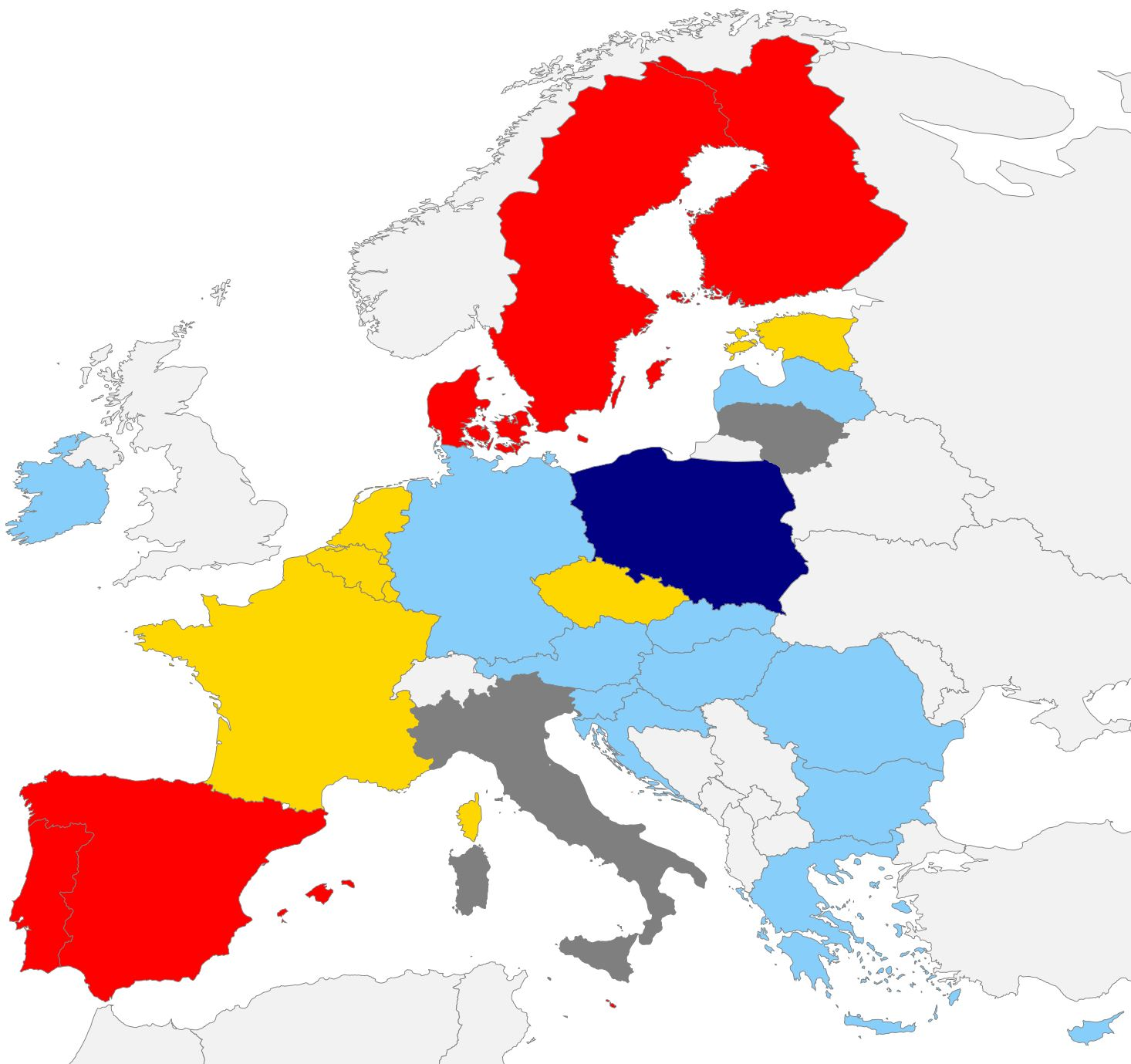 Consiglio Europeo (mappa)